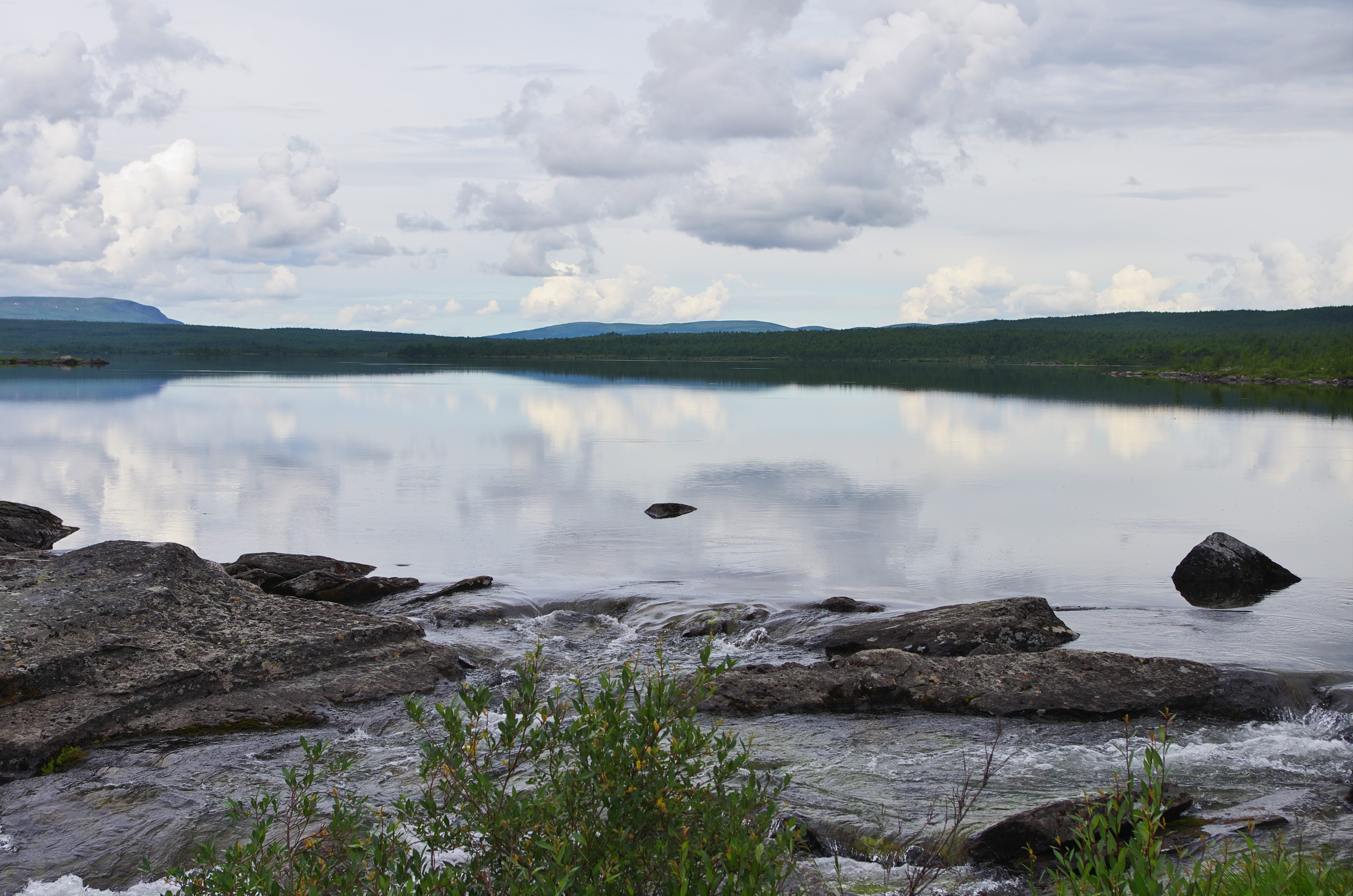 Sjön Lutaure (Luvtávrre) i Pieljekaise nationalpark i Arjeplogs kommun i Lappalnd, Sverige.